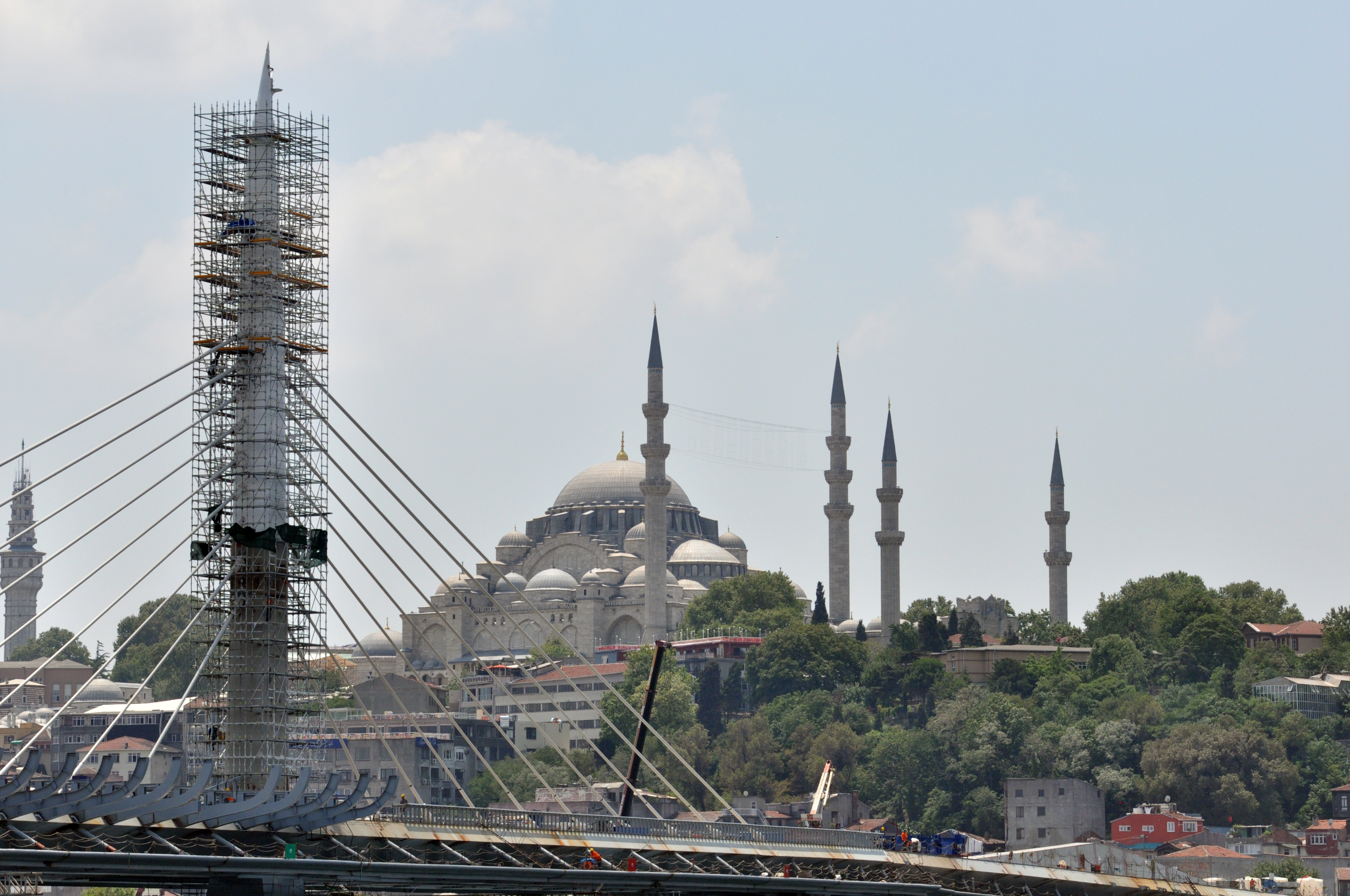 Istambul